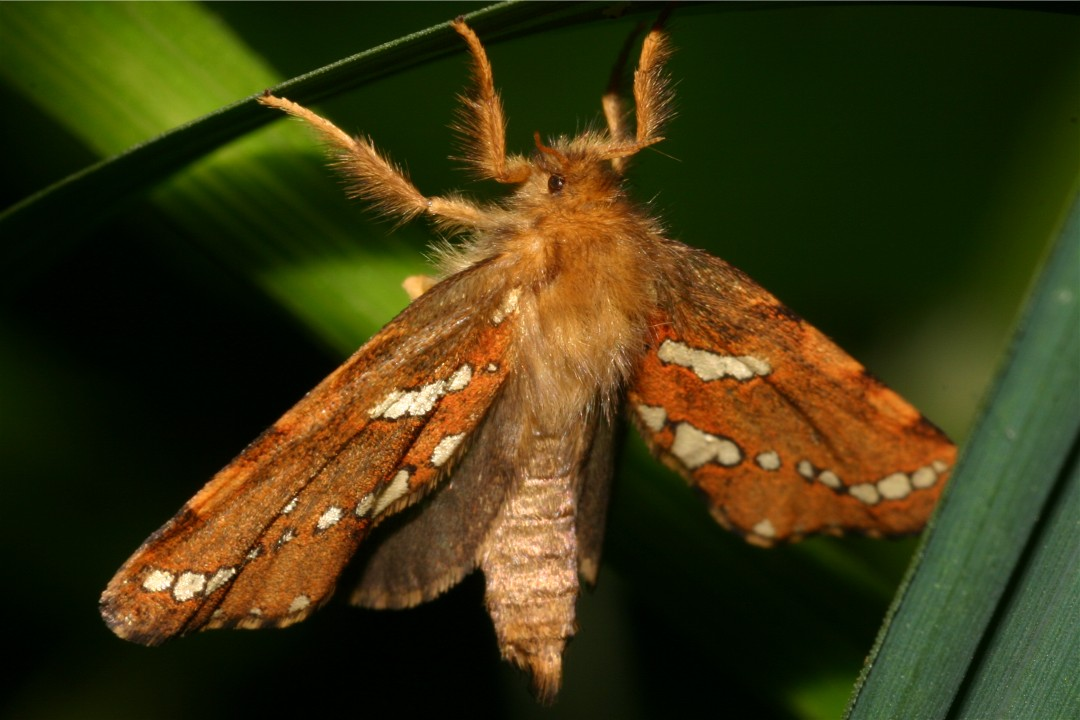 Heidekraut-Wurzelbohrer (Phymatopus hecta)